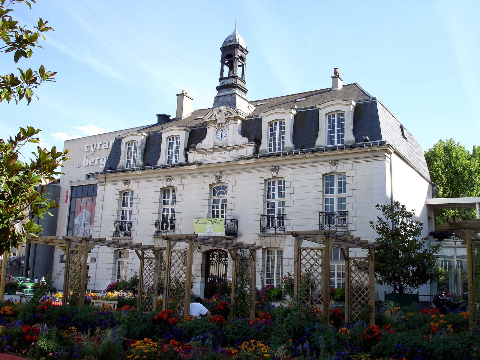 Le musée Utrillo-Valadon à Sannois, Val-d'Oise, France.